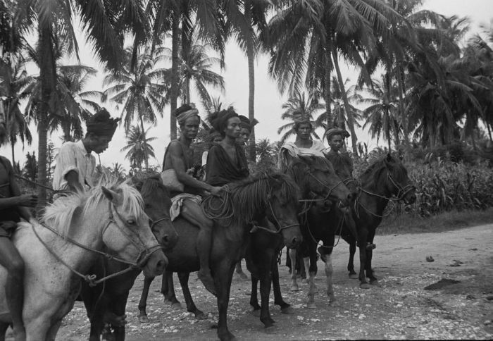 negatief. Mannen te paard, wachtend bij een veerpont in de omgeving van Waingapu.